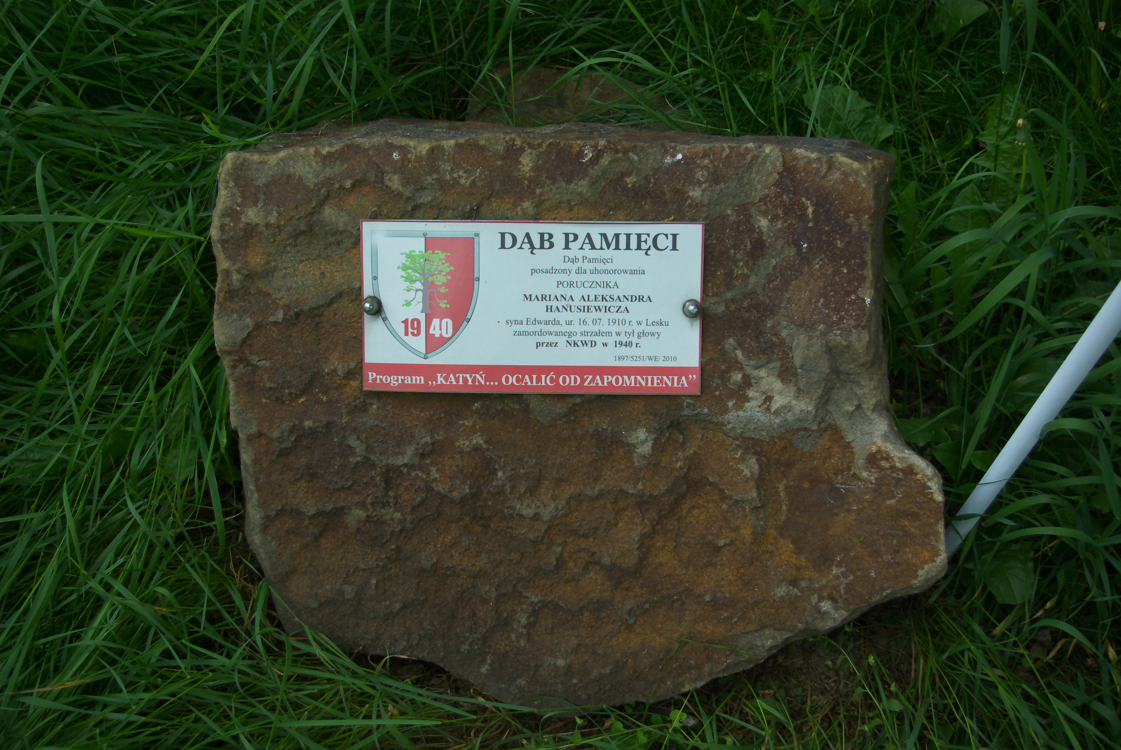 Dąb Pamięci honorujący Mariana Hanusiewicza w Trepczy